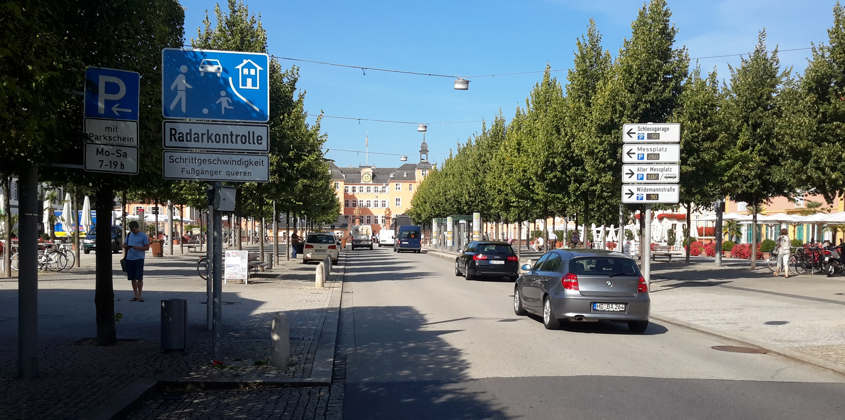 Die Mittelachse mit Straßentrasse des Schwetzinger Schlossplatzes, von Osten aufgenommen; im Hintergrund das Schloss